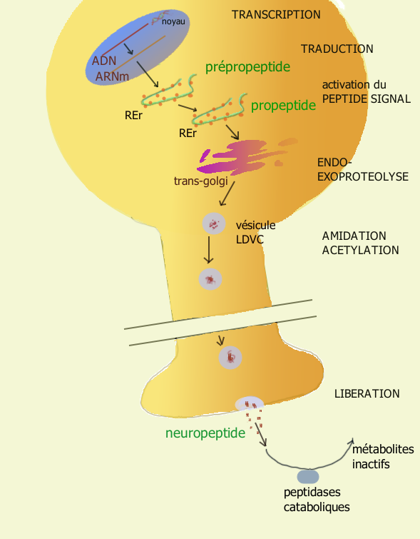 Etapes de la synthèse des neuropeptides, d'après Nestler et al Molecular pharmacology2009